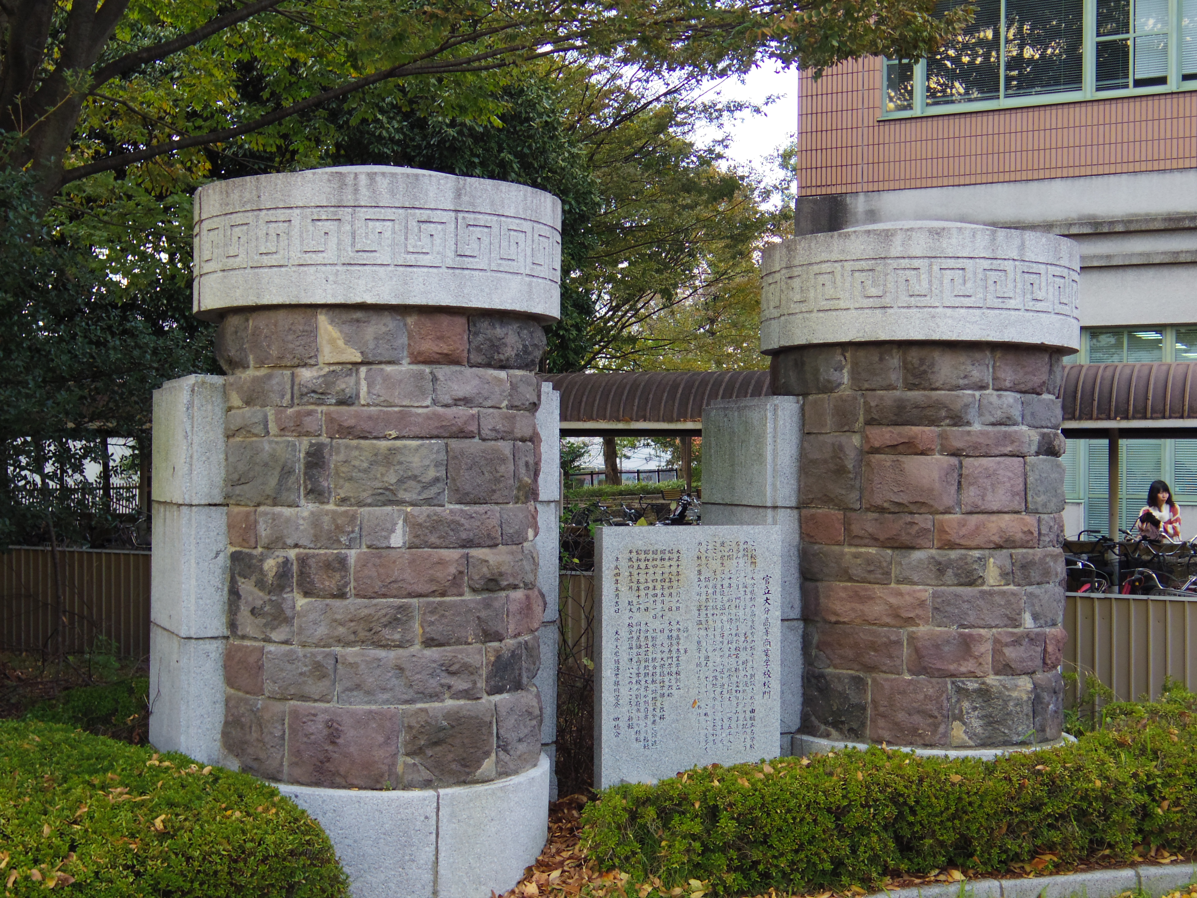 旧制大分高商の正門です。(大分県立芸術文化短期大学内)